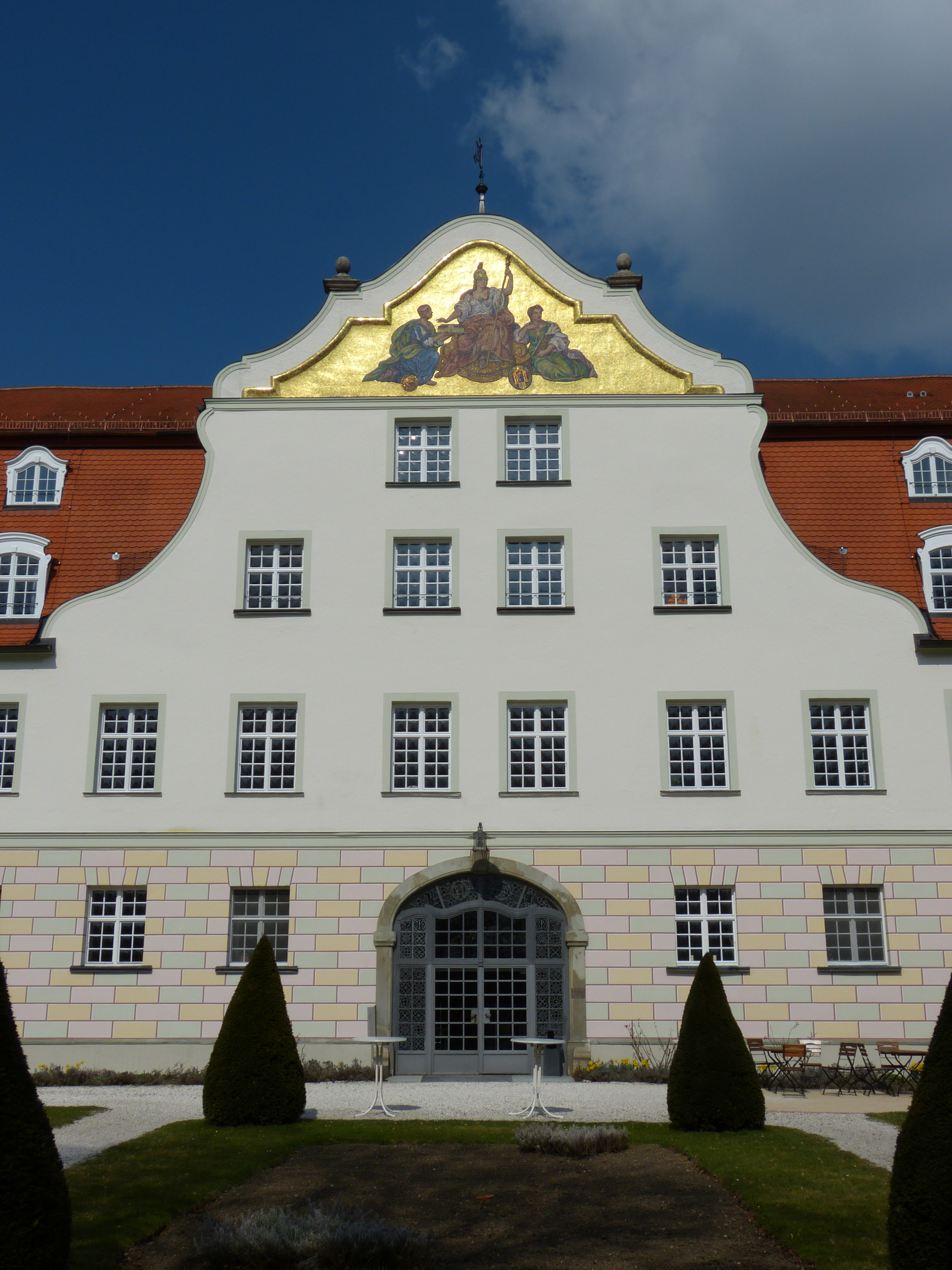 Schloss Lautrach, Gemeinde Lautrach, Landkreis Unterallgäu, Bayern